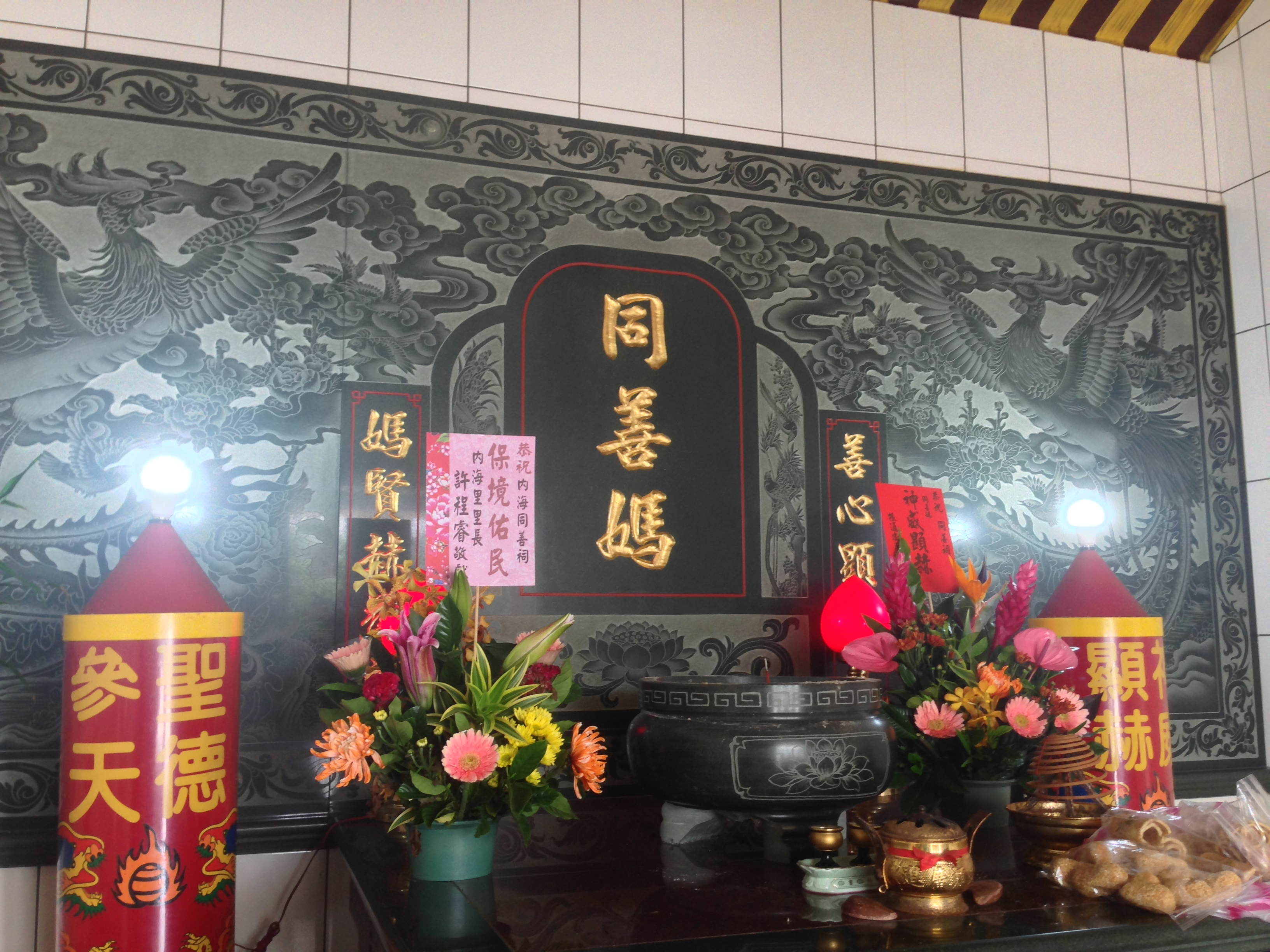 中文（台灣）: 大園內海同善祠神位